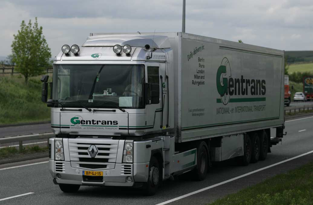 GENTRANS-RENAULT